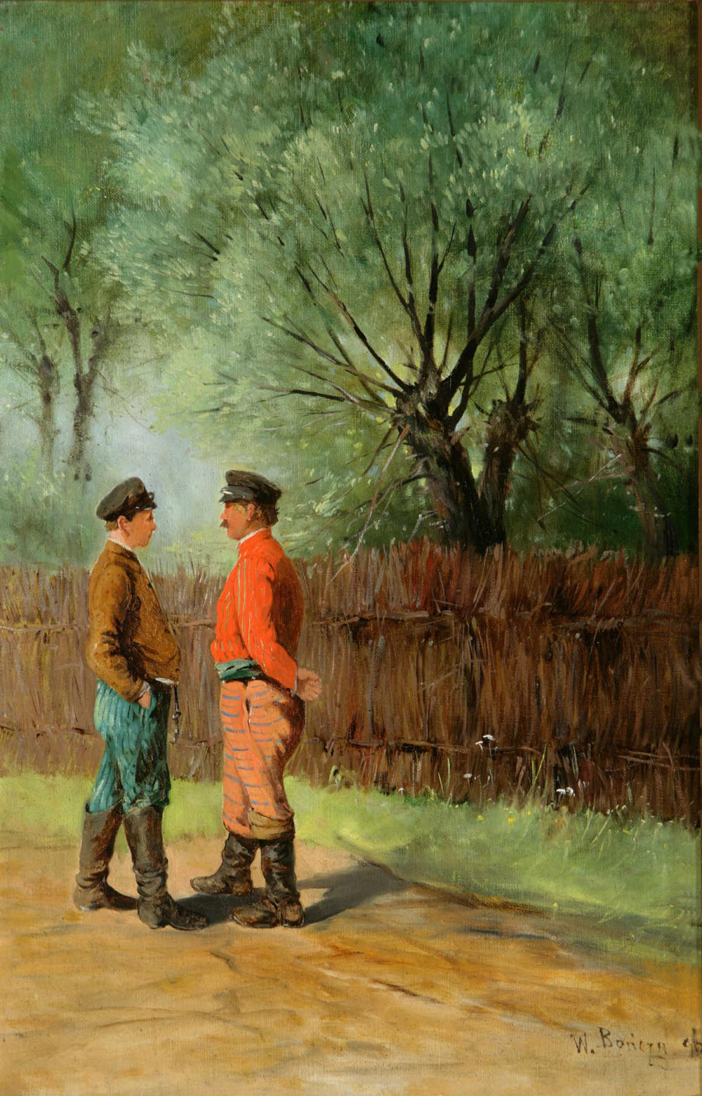 Rozmawiający chłopi